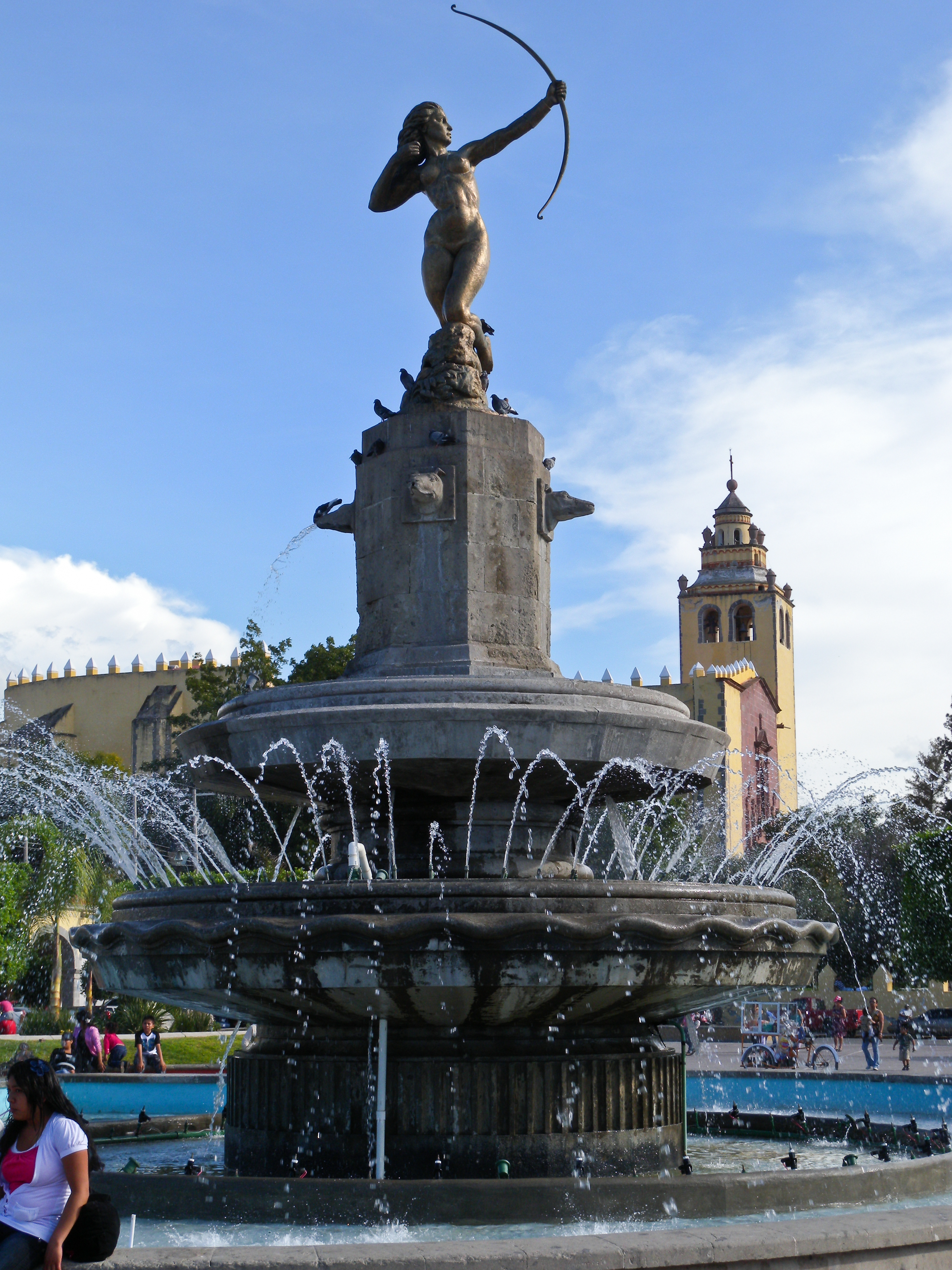 Ixmiquilpan, Hidalgo, México